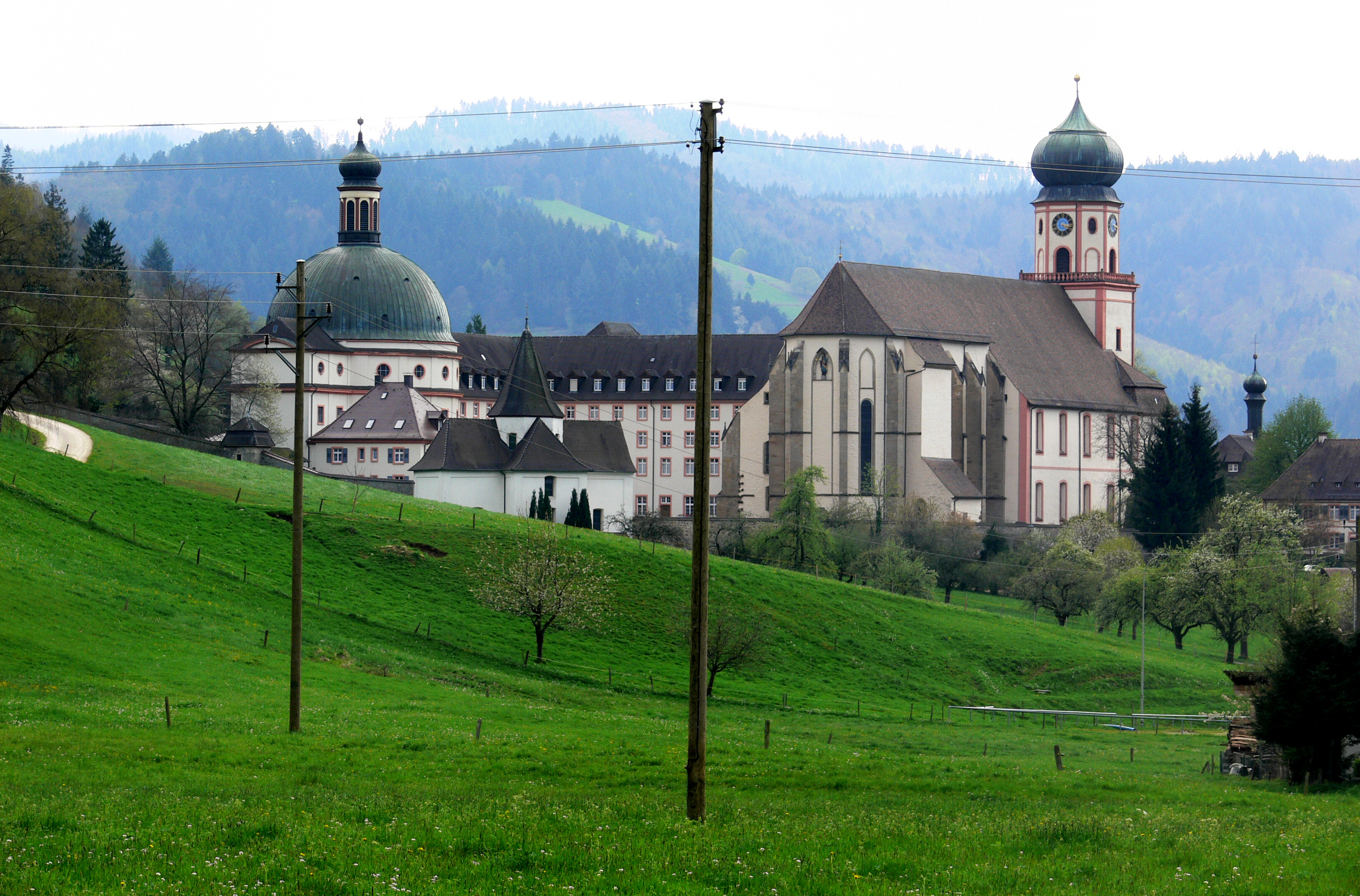 Kloster St. Trudpert im Schwarzwald, Gemeinde Münstertal Drei Kirchen: ganz links mit der Kuppel die neue Klosterkirche des Nonnenklosters, in der Mitte im Vordergrund die Trudpertkapelle, rechts die ehemalige Klosterkirche St. Trudpert